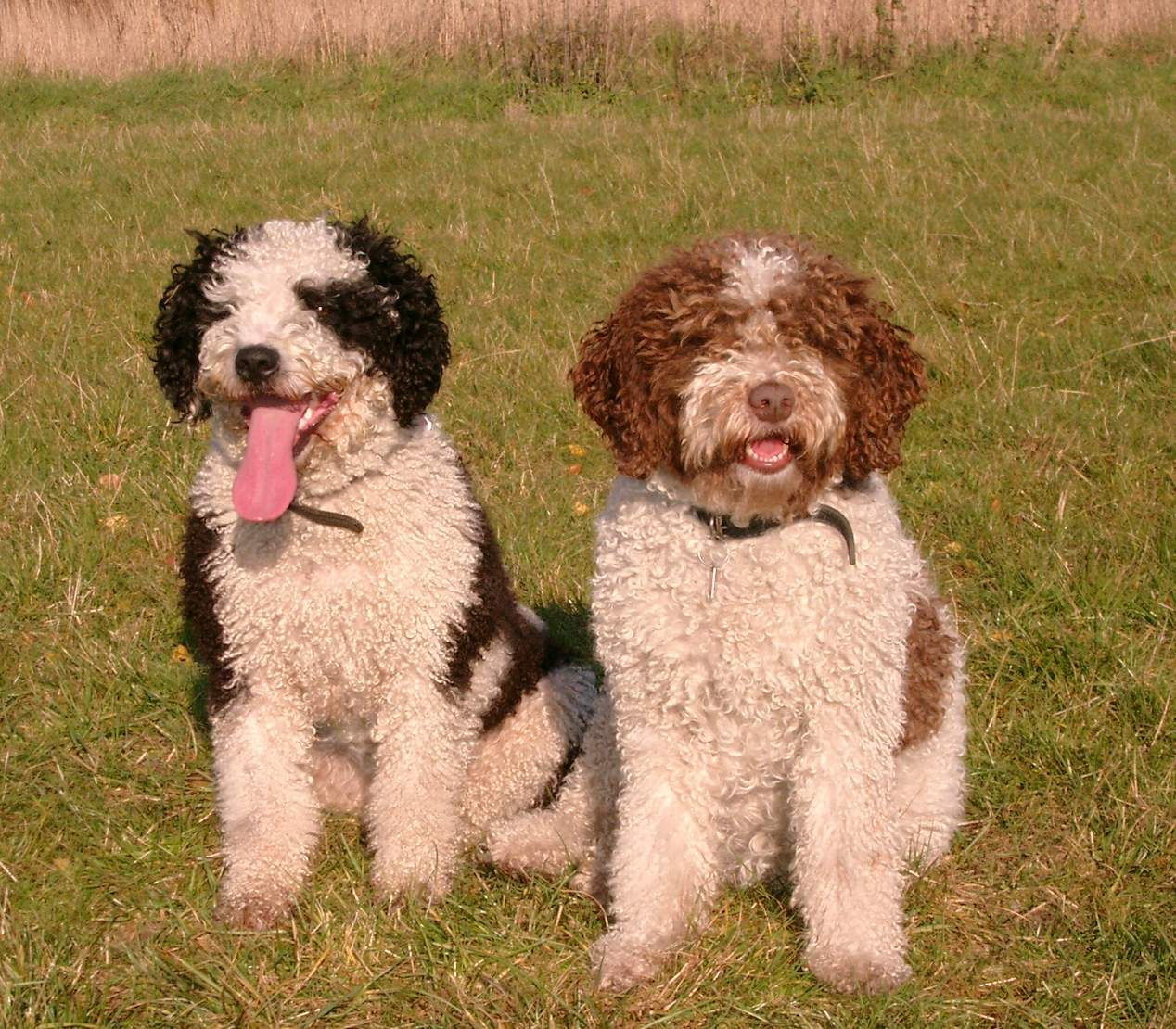 Perro de Aguas in schwarz-weiss und braun-weiss Autor:Susanne Lorenz eigene Aufnahme aufgenommen:7.11.2003